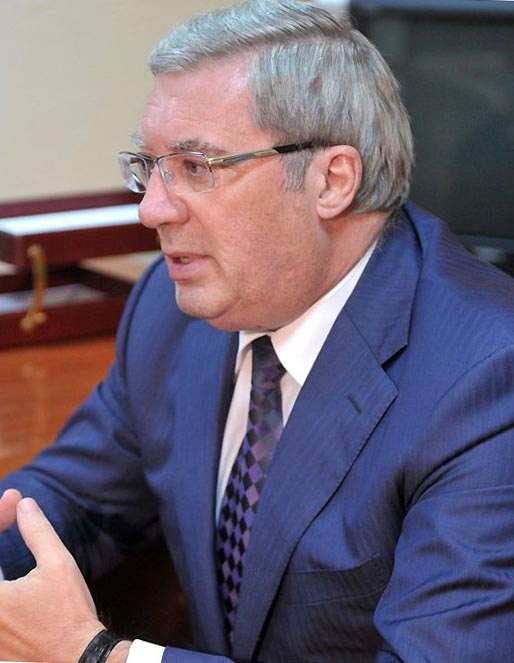 Полномочный представитель Президента в Сибирском федеральном округе Виктор Толоконский